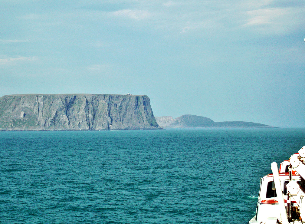 Cabo Norte (en primer plano), Knivskjellodden (al fondo) Nordkapp (foreground) & Knivskjellodden (background)